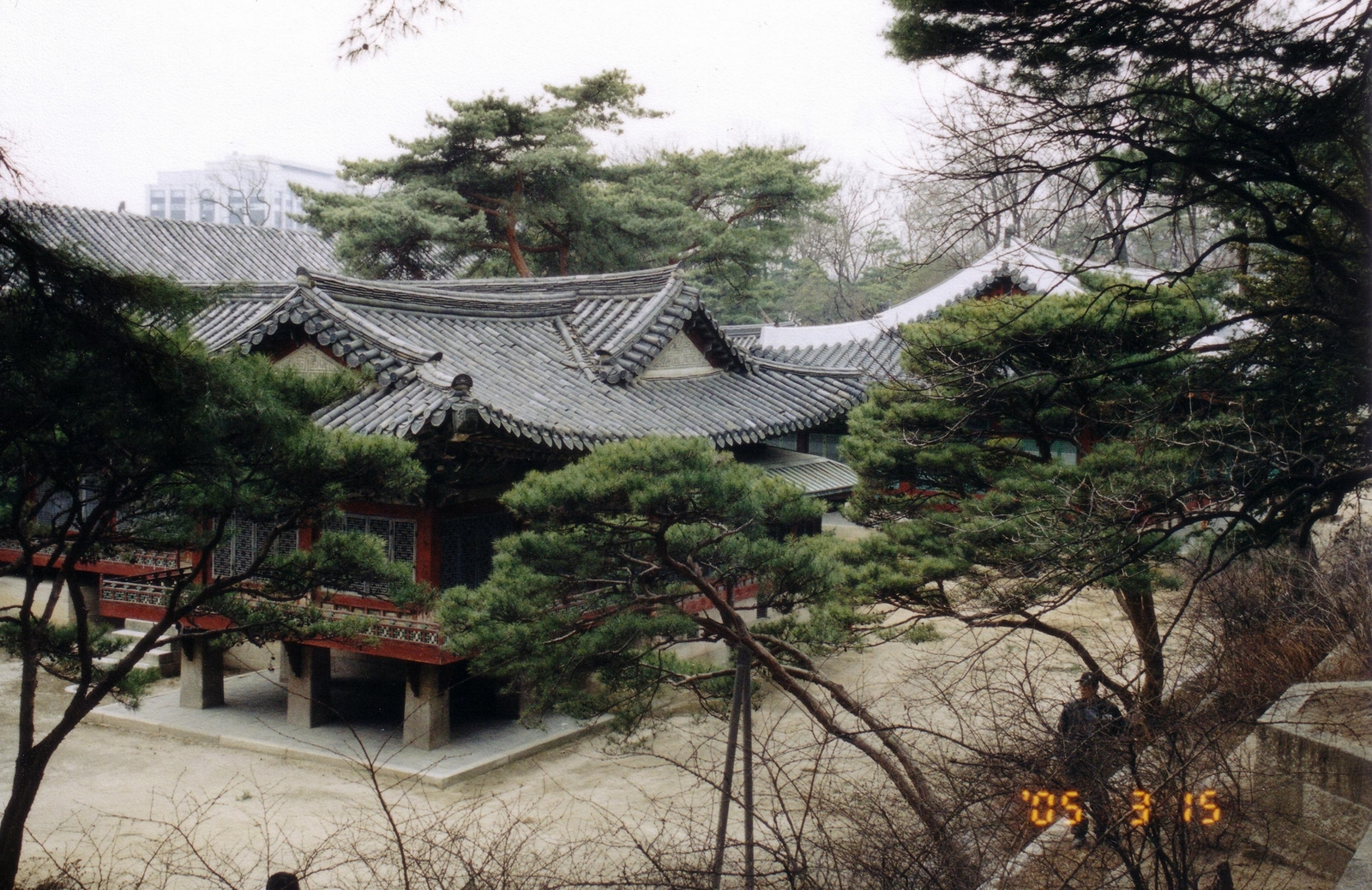 Cheongungyo und Baegungyo im Bulguksa